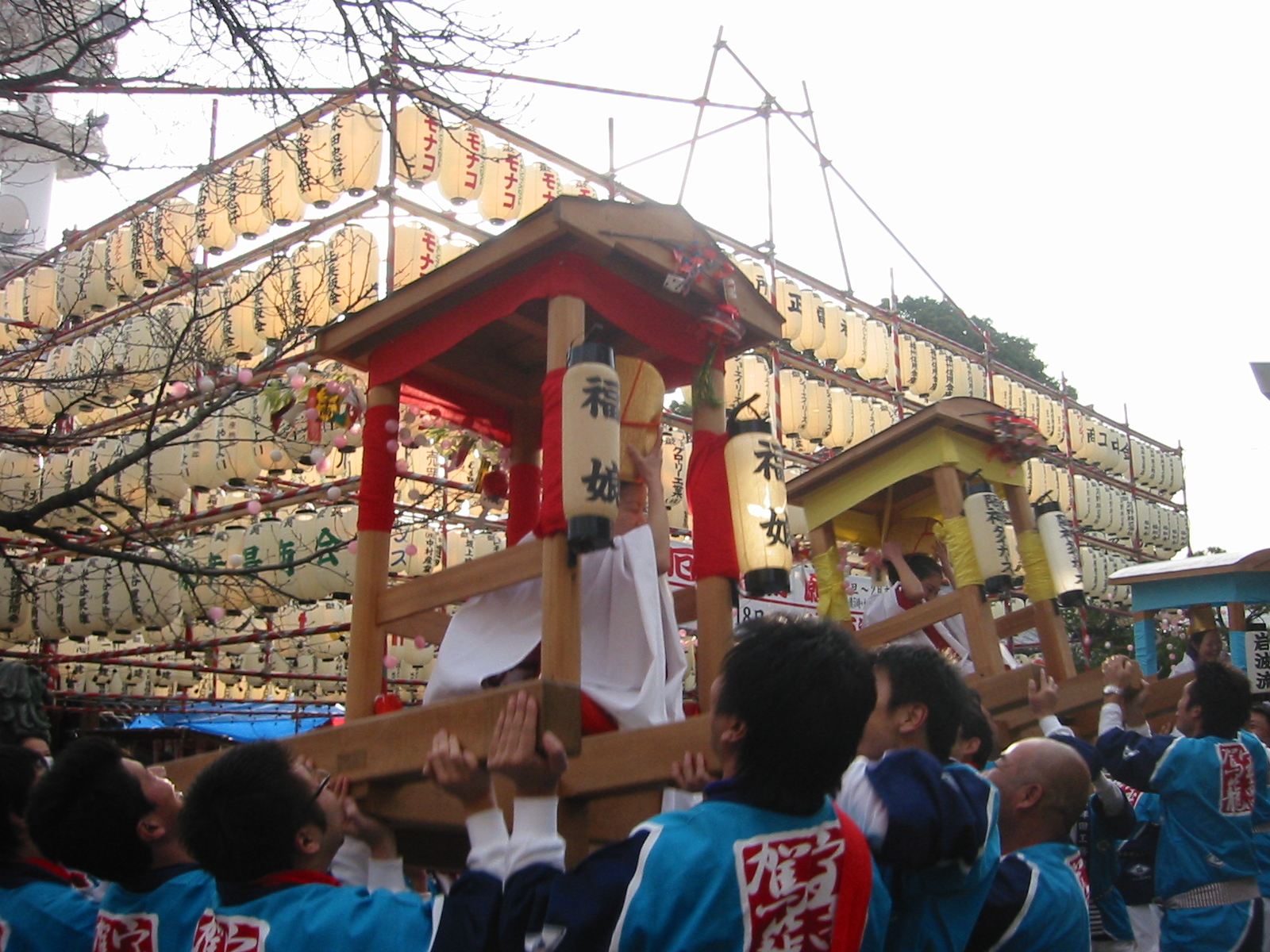 射楯兵主神社(播磨國總社)えびす講(初ゑびす祭)縁起担ぎの福娘の乗る宝恵駕籠